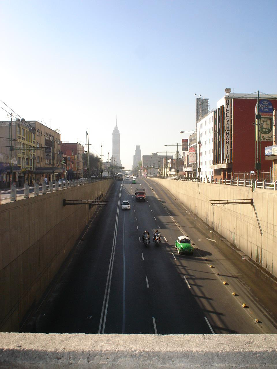 VISTA DEL EJE CENTRAL LAZARO CARDENAS DESDE LA ESTACION GARIBALDI